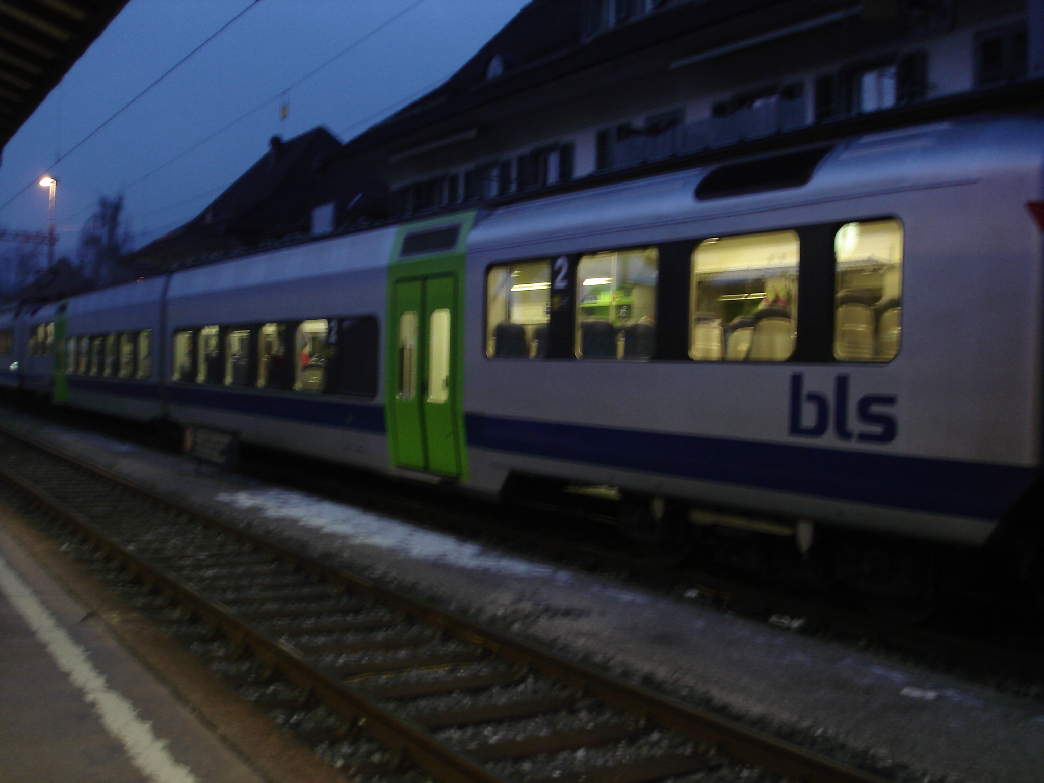 B Jumbo in Langnau